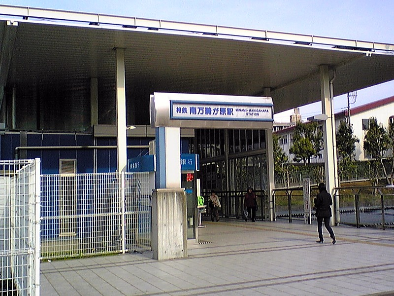 相鉄いずみ野線南万騎が原駅 / Minami-Makigahara Station (Sagami Railway Izumi-no line)